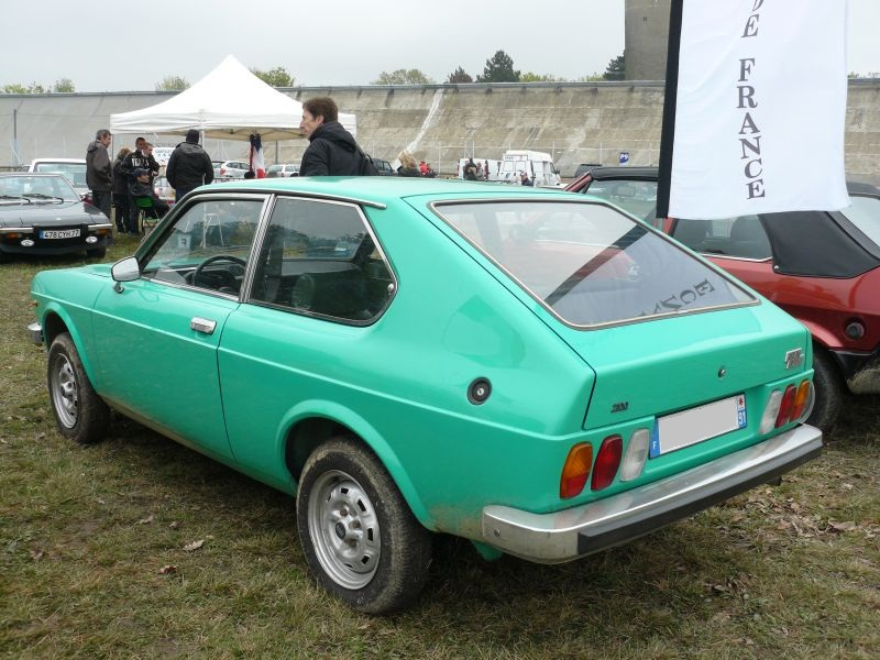 Français cadien: Fiat 128 3P, Montlhery Avril 2012